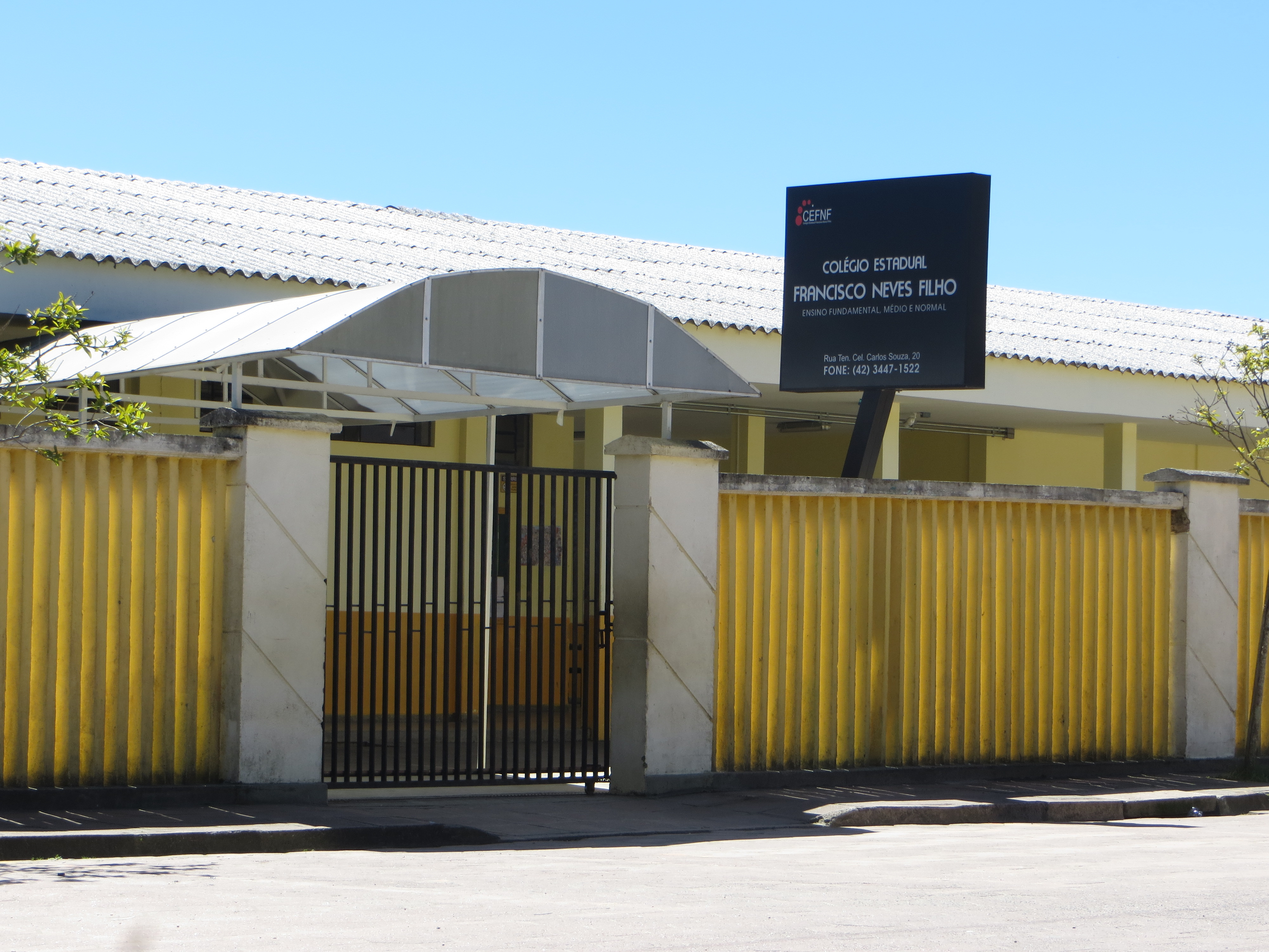 Colégio Estadual Francisco Neves Filho, em São João do Triunfo, estado brasileiro do Paraná, região sul do país.